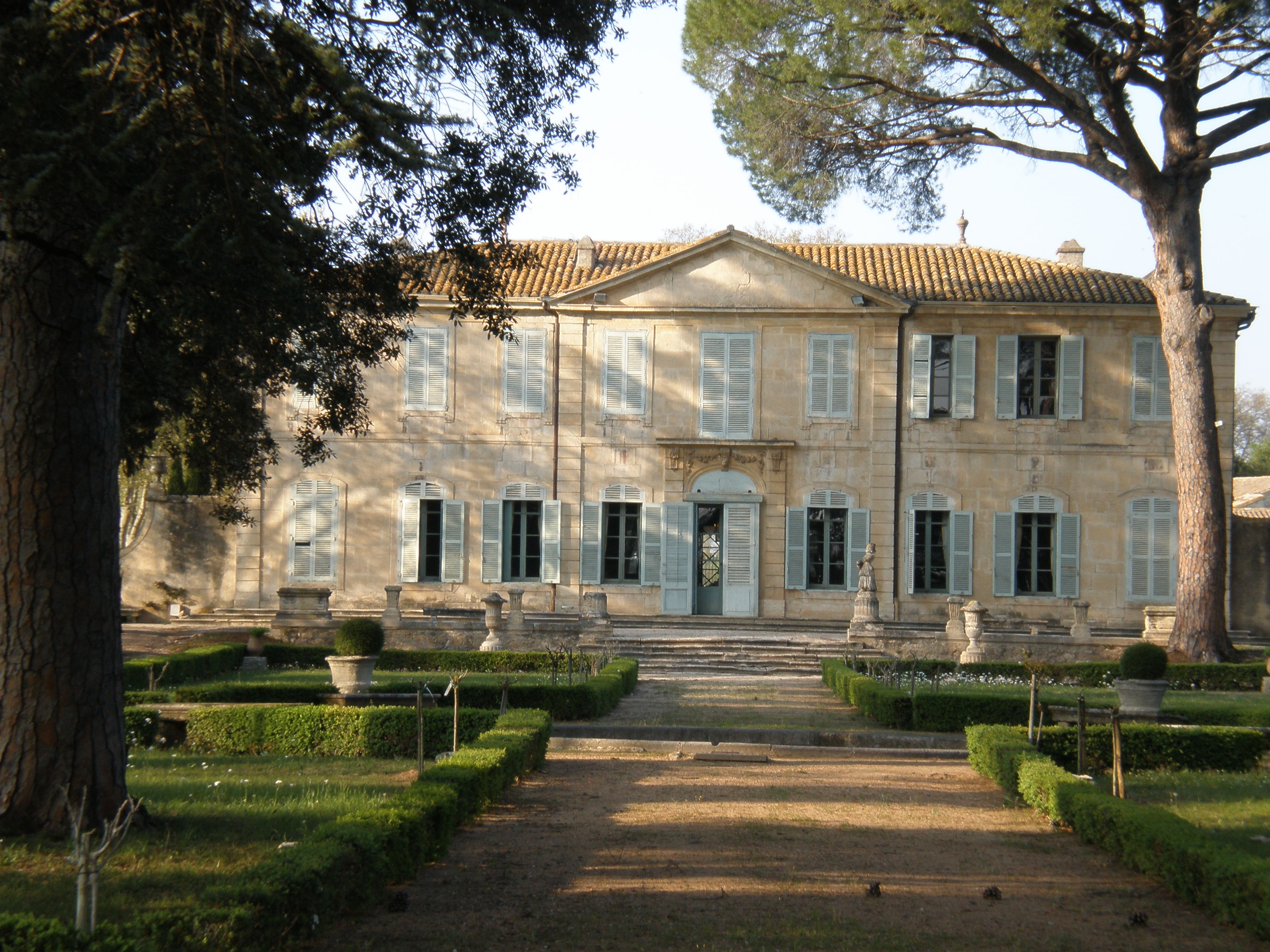 Le Château de la Mogère (Montpellier, Hérault 34)